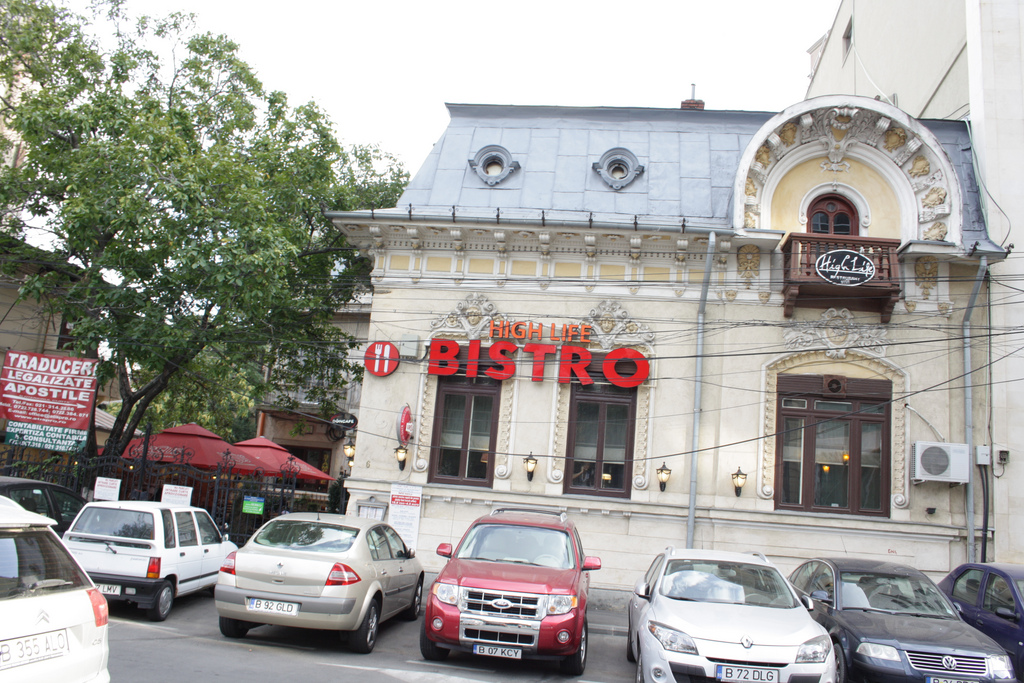 Casa Iulia Constantinescu, Str. Alexandrescu Grigore 6 sector 1